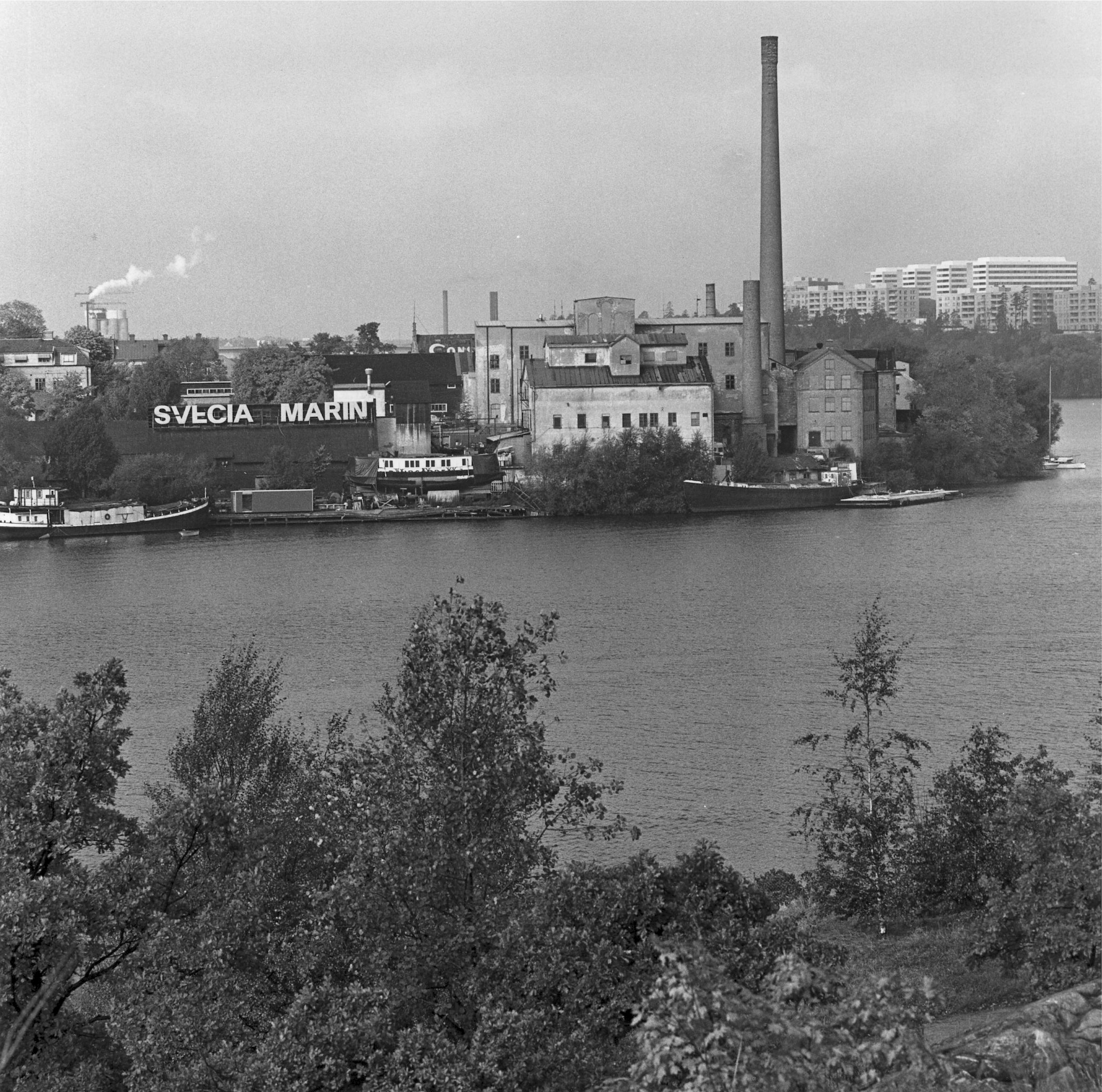 Traneberg 1:6/Stg 2984. f.d. Stockholms Benmjölsfabrik AB, Traneberg (idag plats för bostadsområdet Minneberg). Vy över fastigheten från öster.